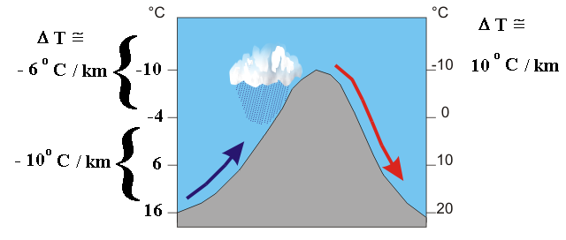 Foehn Effect wich is moist air forced above and obstacle like a mountain by the wind. The cooling is dry adiabat (around 10 C/km) until saturation then moist adiabat (variable with height but on average around 6 c/km)until the top of the obstacle. On the other side, the rate of temprature change is dry adiabat. --- Effect de Foehn où l'air est soulevé par le vent au-dessus d'un obstacle. Le taux de décroissance de la température est celui de l'adiabatique sèche (environ -10C/km) jusqu'au niveau de saturation puis celui adiabatique humide jusqu'au sommet de l'obstacle (variable avec la pression mais de moyenne de -6C/km).